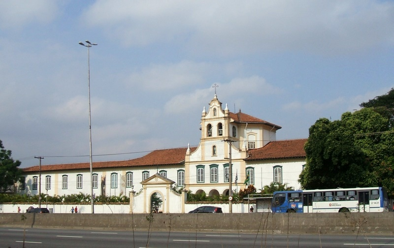 Mosteiro da Luz, sede do Museu de Arte Sacra de São Paulo, em São Paulo, Brasil.